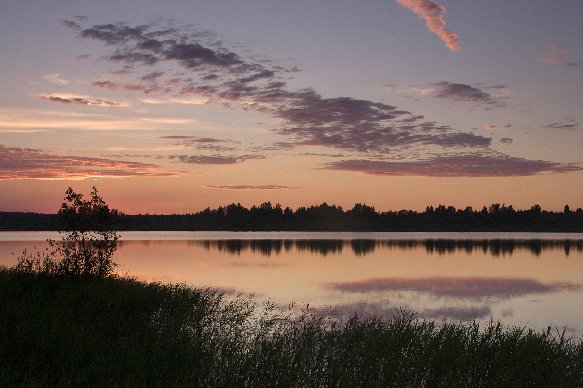 Jõemõisa järv. Jõemõisa-Kaiu järvestik.